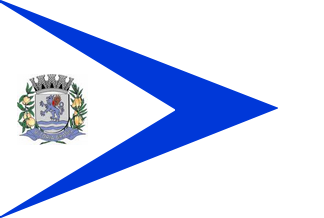 Bandeira de Vitória Brasil - SP - Brasil.